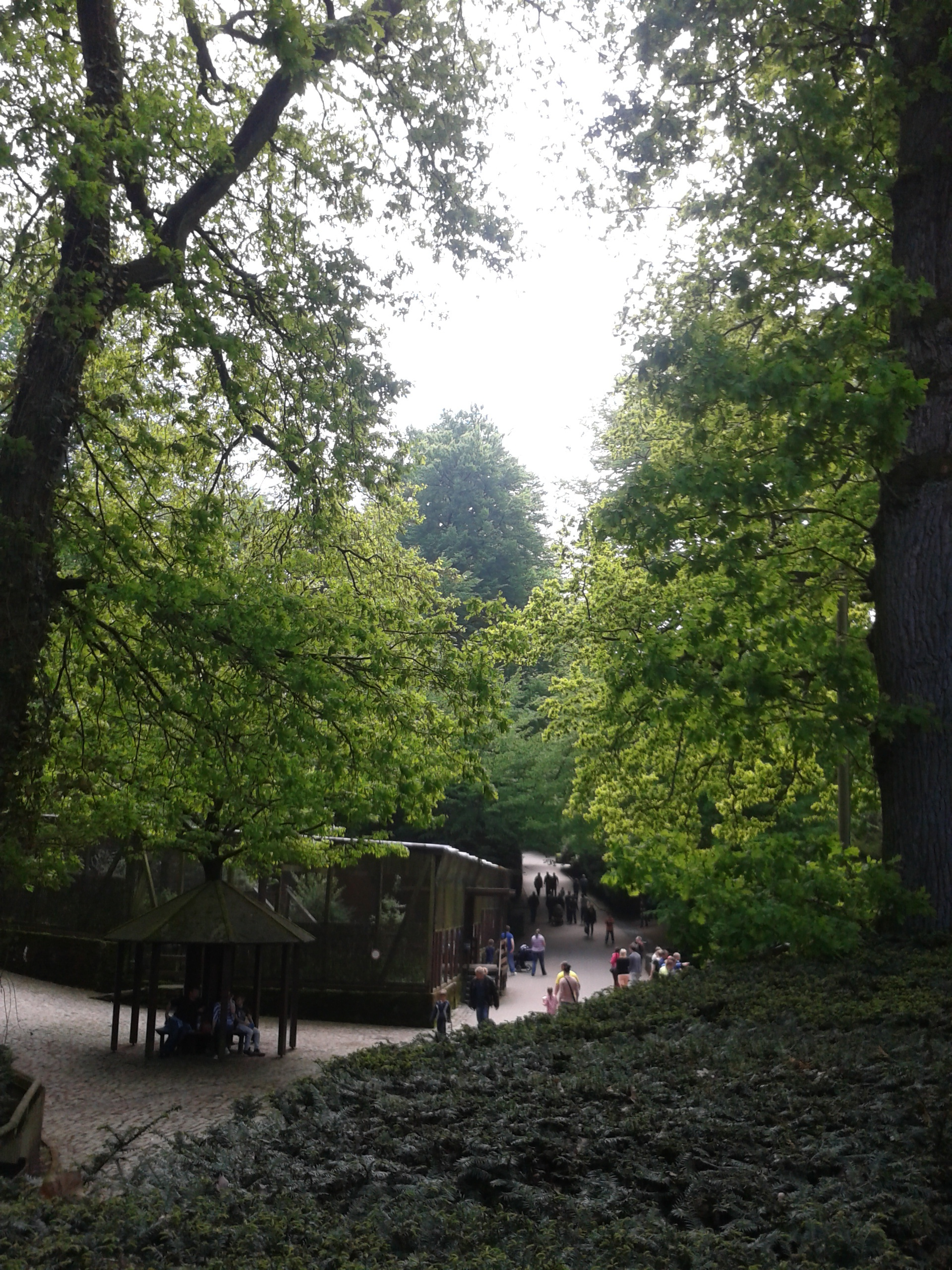 Szene im Tierpark Olderdissen Bielefeld.